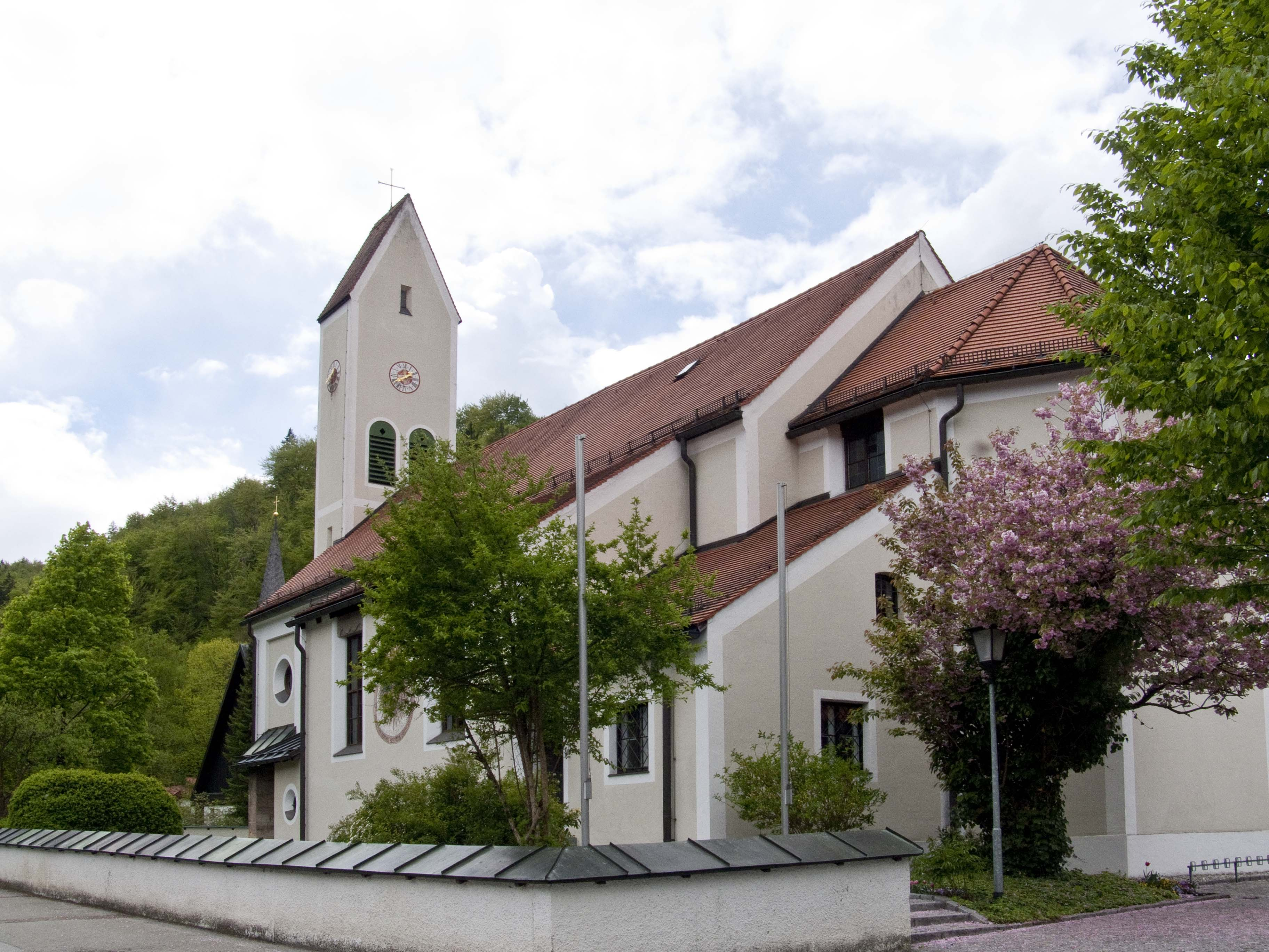 historisierender Saalbau mit offenem Dachstuhl und westlichem Sattelturm, 1868-73, 1938 umgestaltet und erweitert; mit Ausstattung